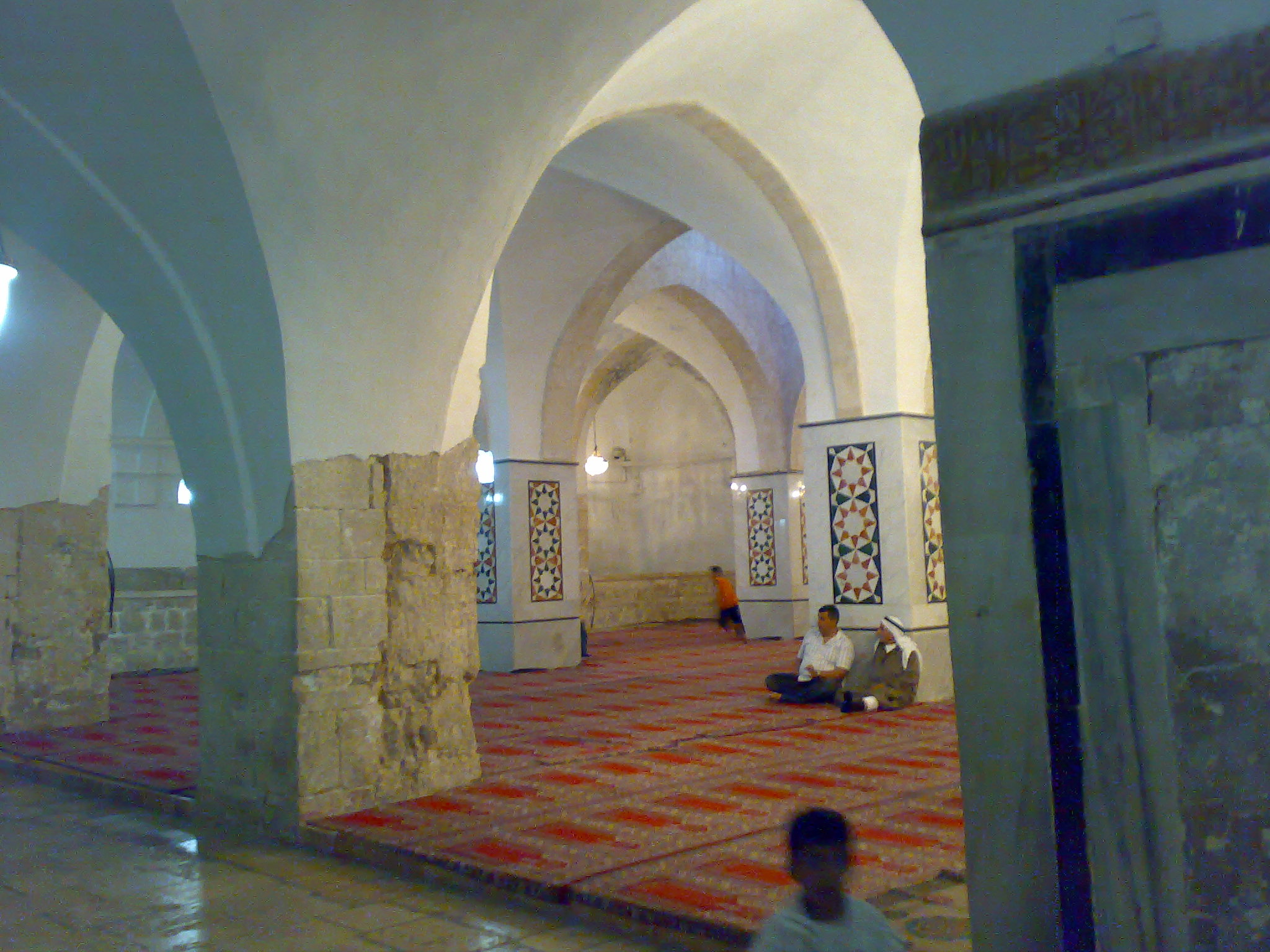 Jaoulia Mosque